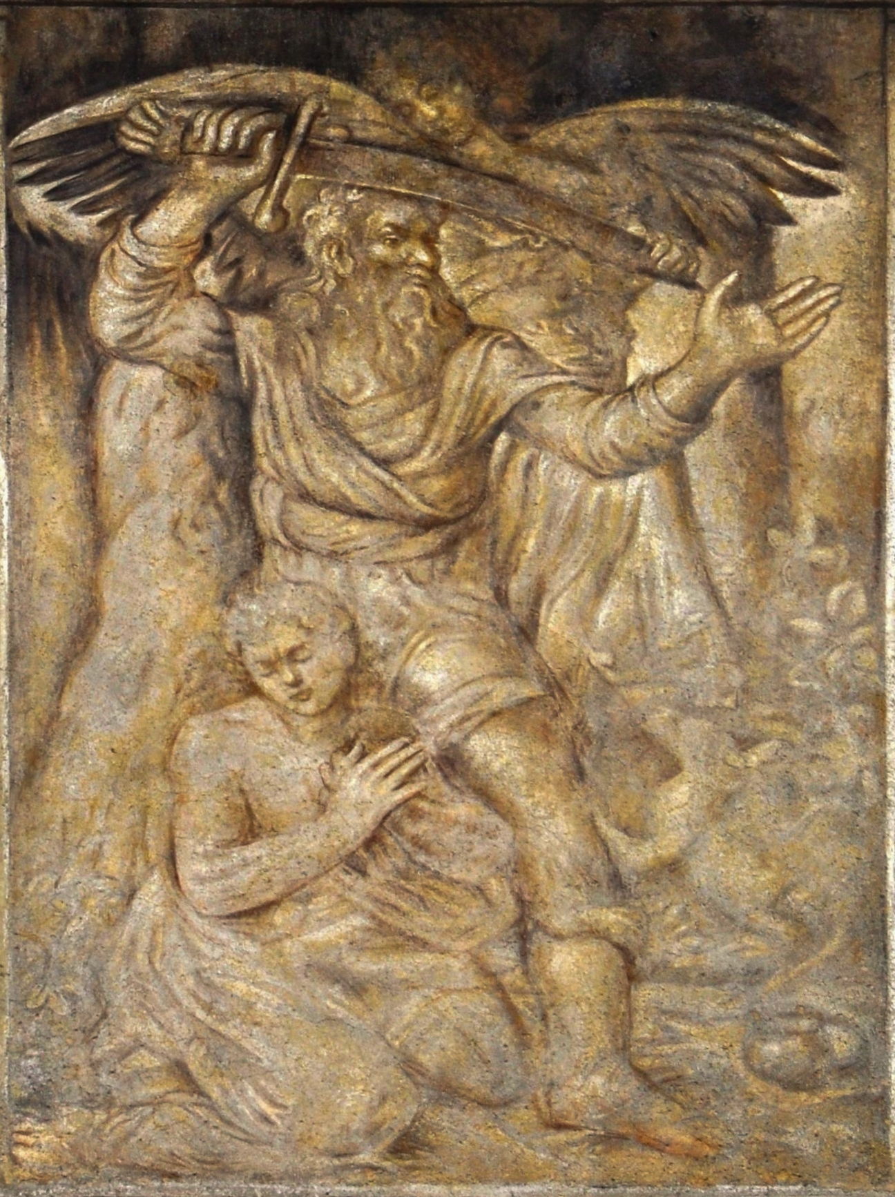 Sgrafitová renesanční výzdoba paláce Granovských v Ungeltu. Námětem je obětování Izáka.